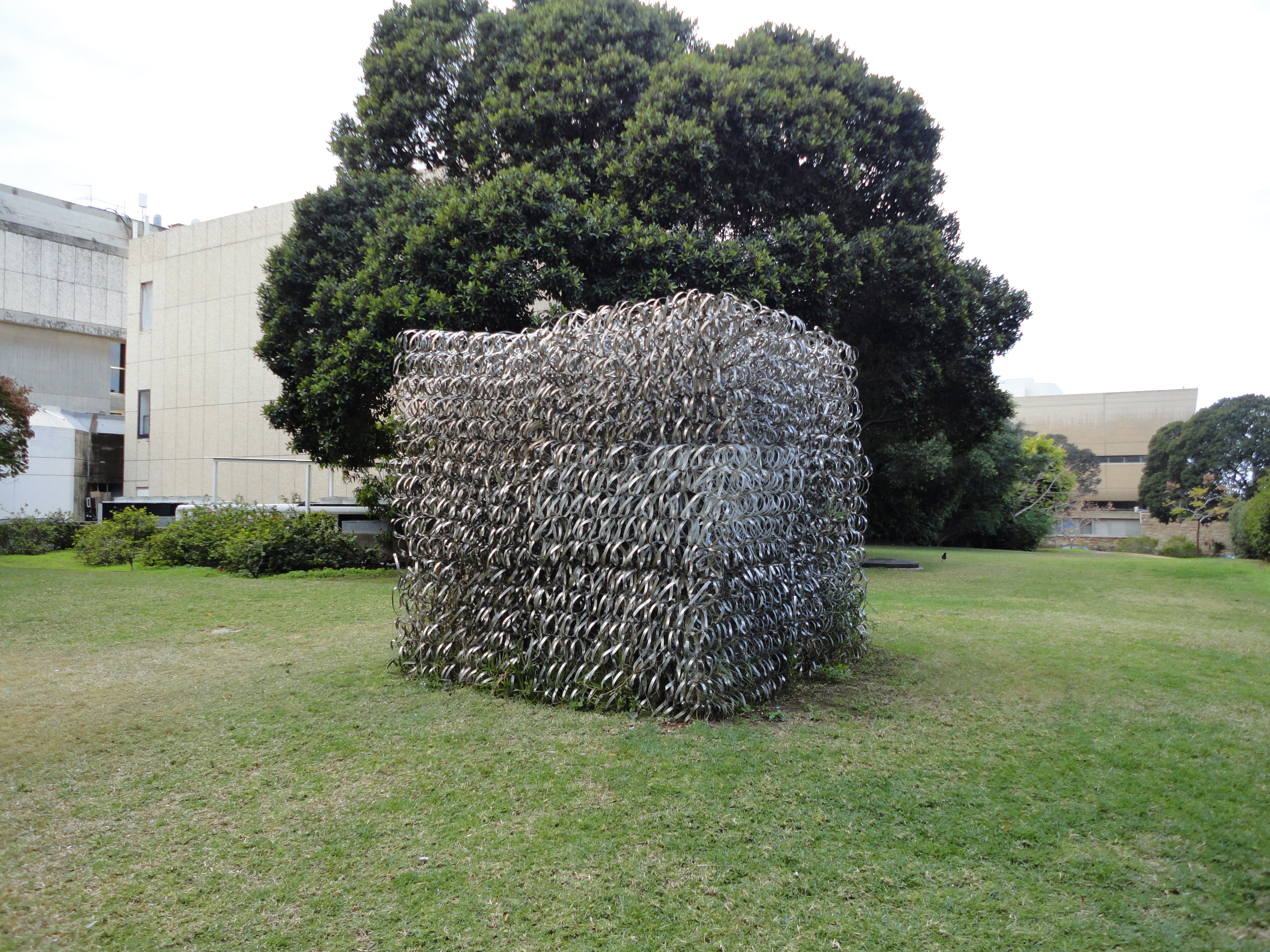 Sculpture